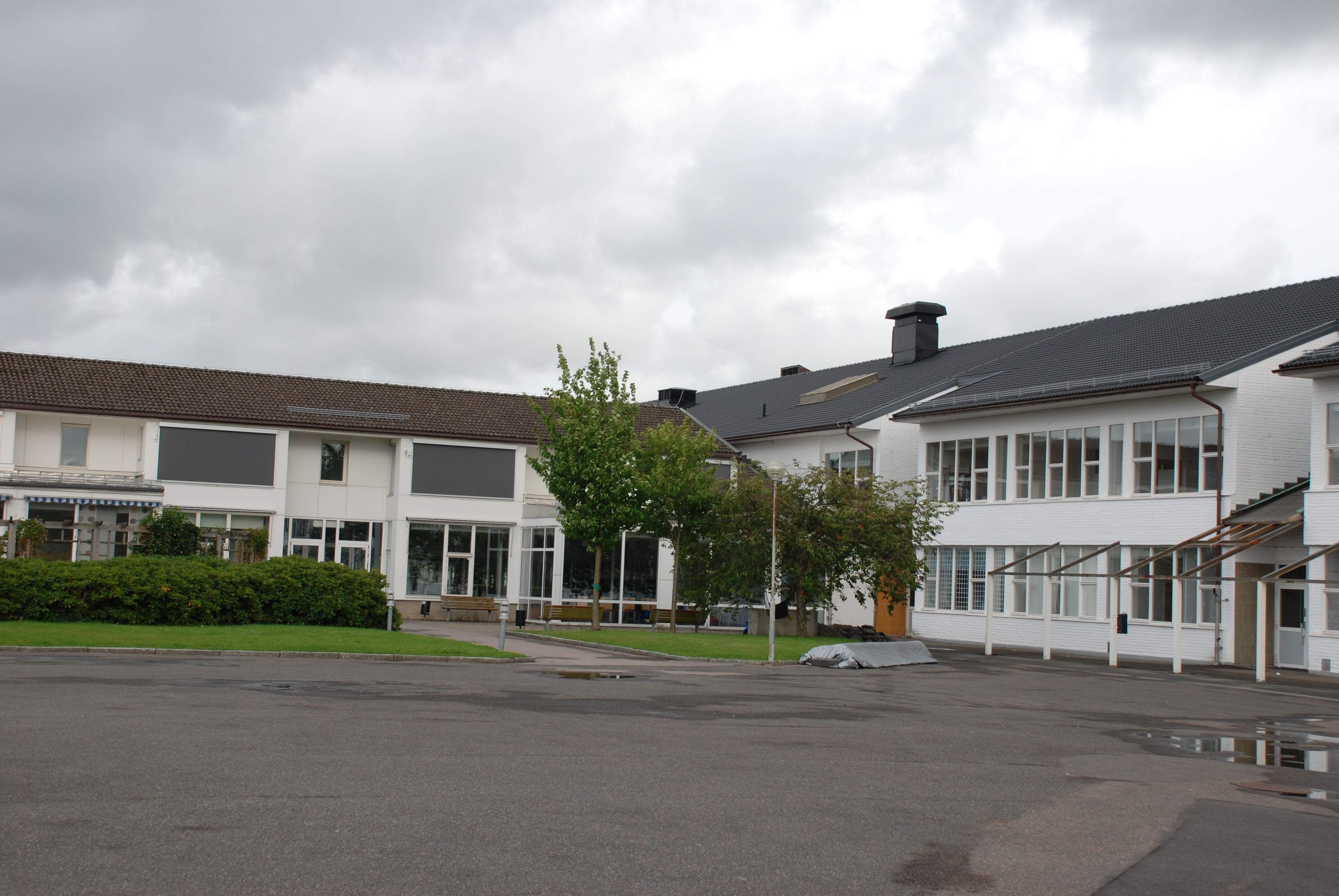 Fässbergsgymnasiet i Mölndal. Huvudbyggnaden.